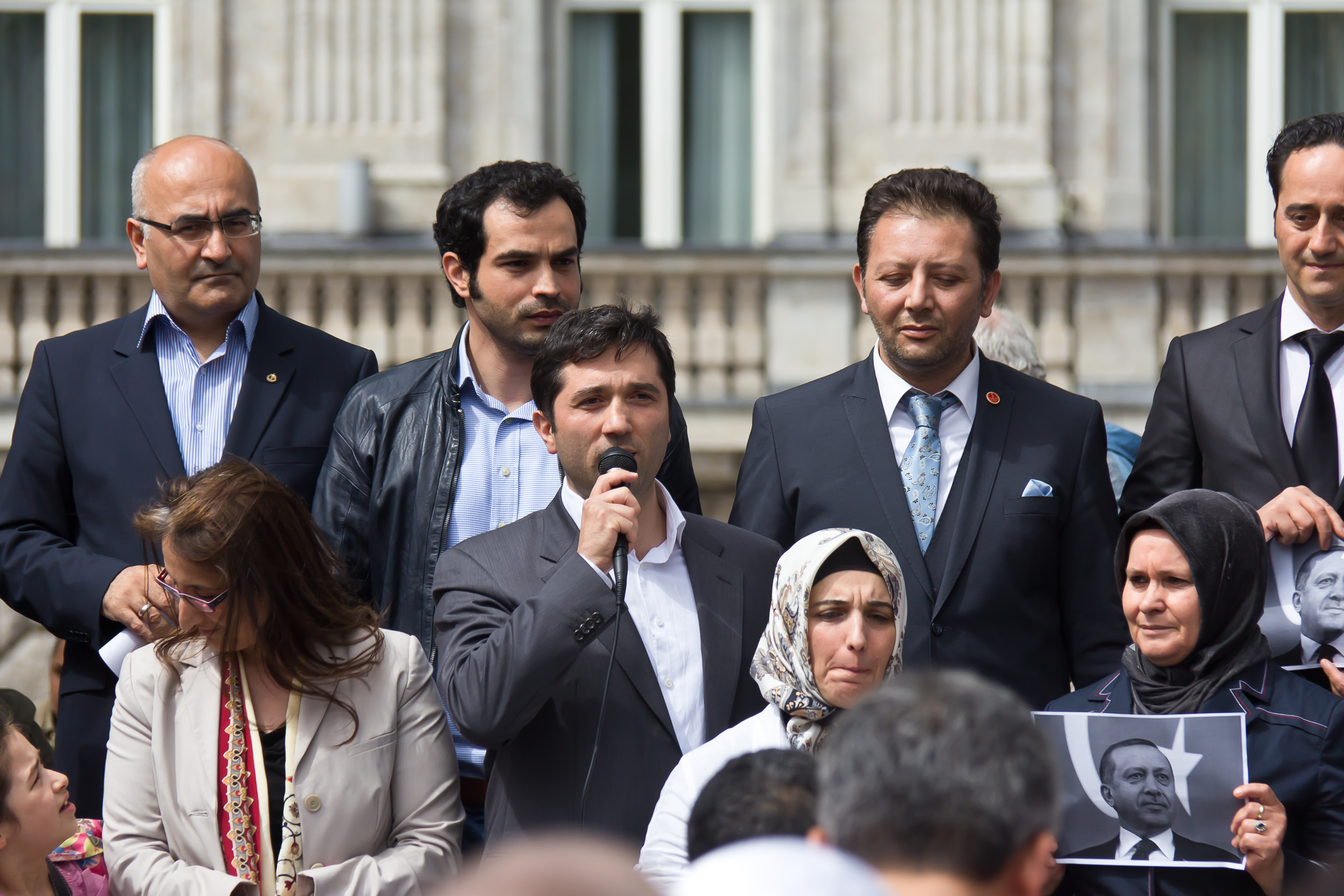 Kundgebung des Union Europäisch-Türkischer Demokraten (UETD) e.V. in Köln auf der Domplatte. Thema: „Aktuelle Ereignisse in der Türkei“